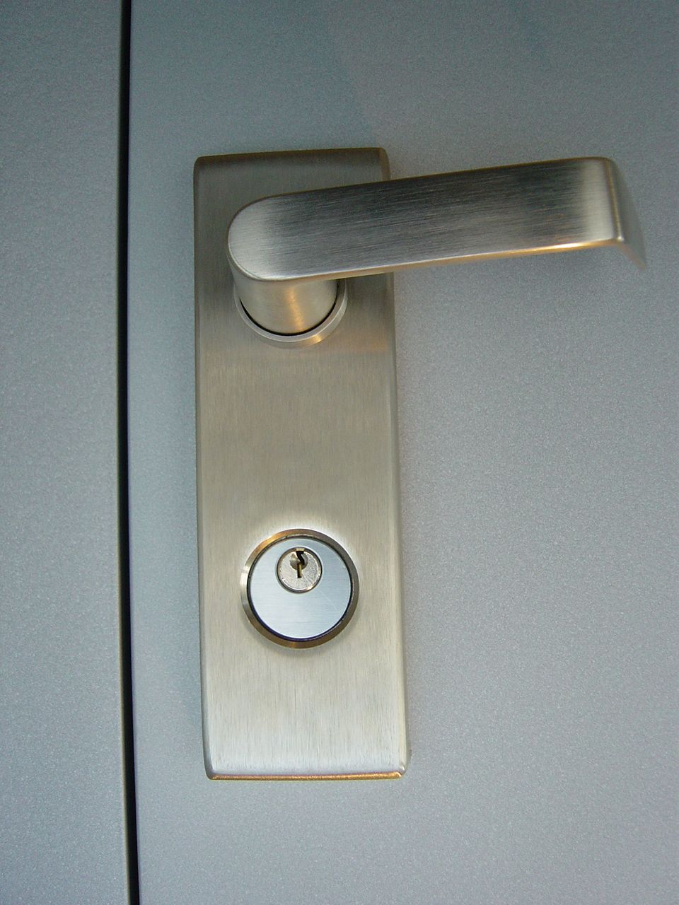 Türbeschlag, Türdrücker, Griff der Firma Dorma